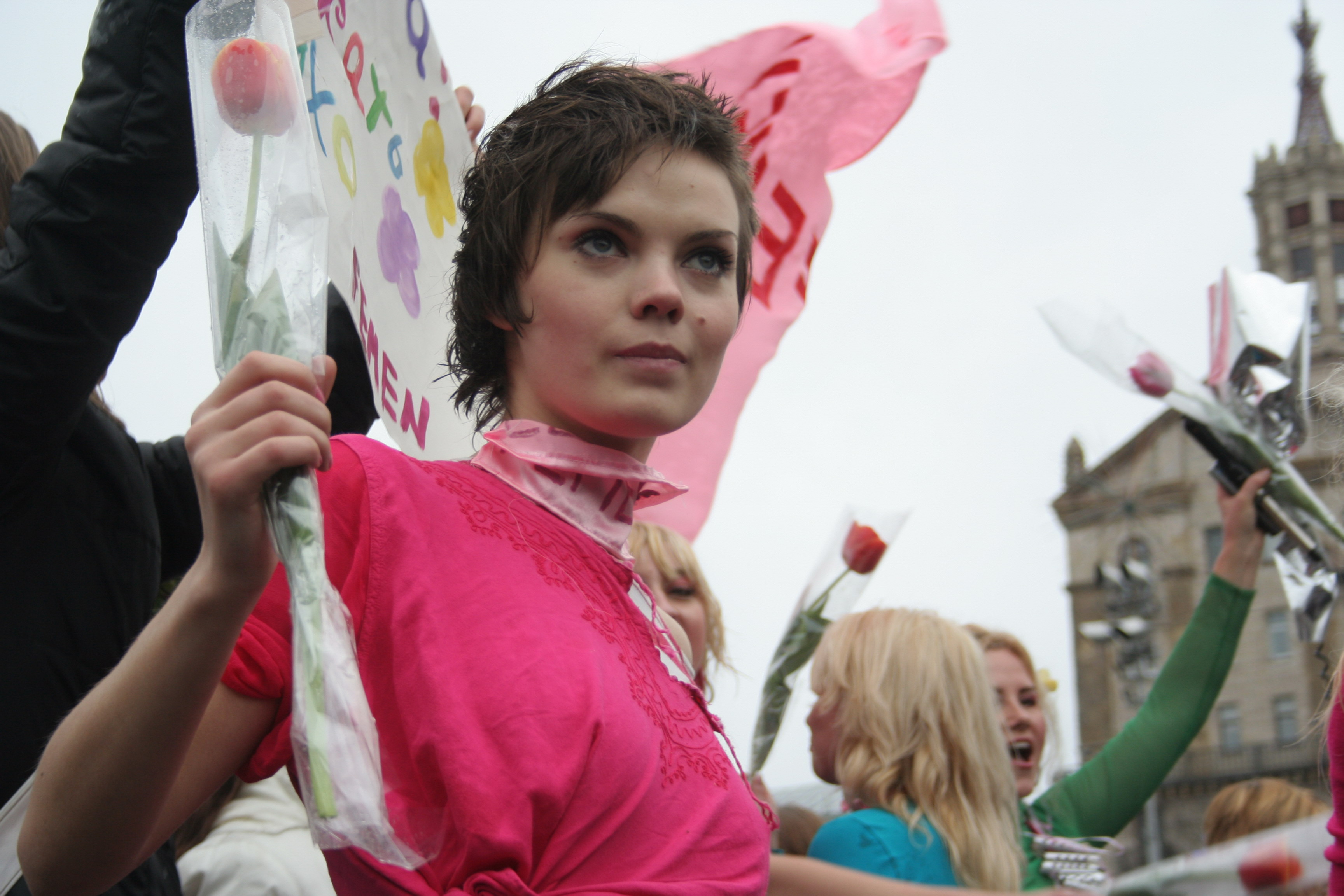 Oksana Shachko